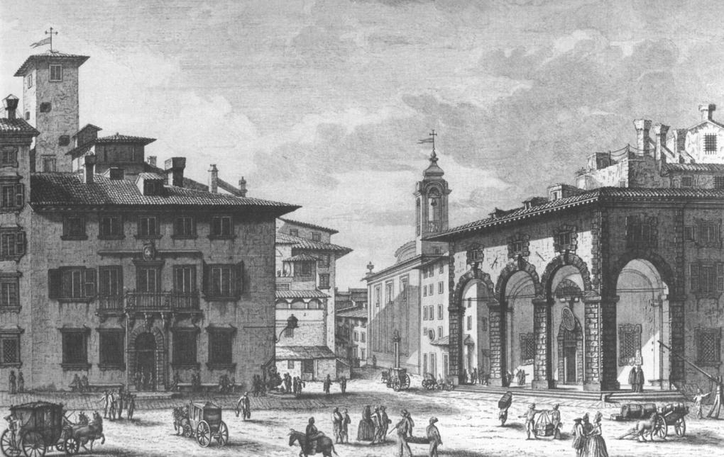 Sulla sinistra il Palazzo del Governatore (prima della ricostruzione del 1840 e oggi scomparso), a destra quello della Dogana. Sullo sfondo la chiesa di San Giovanni.